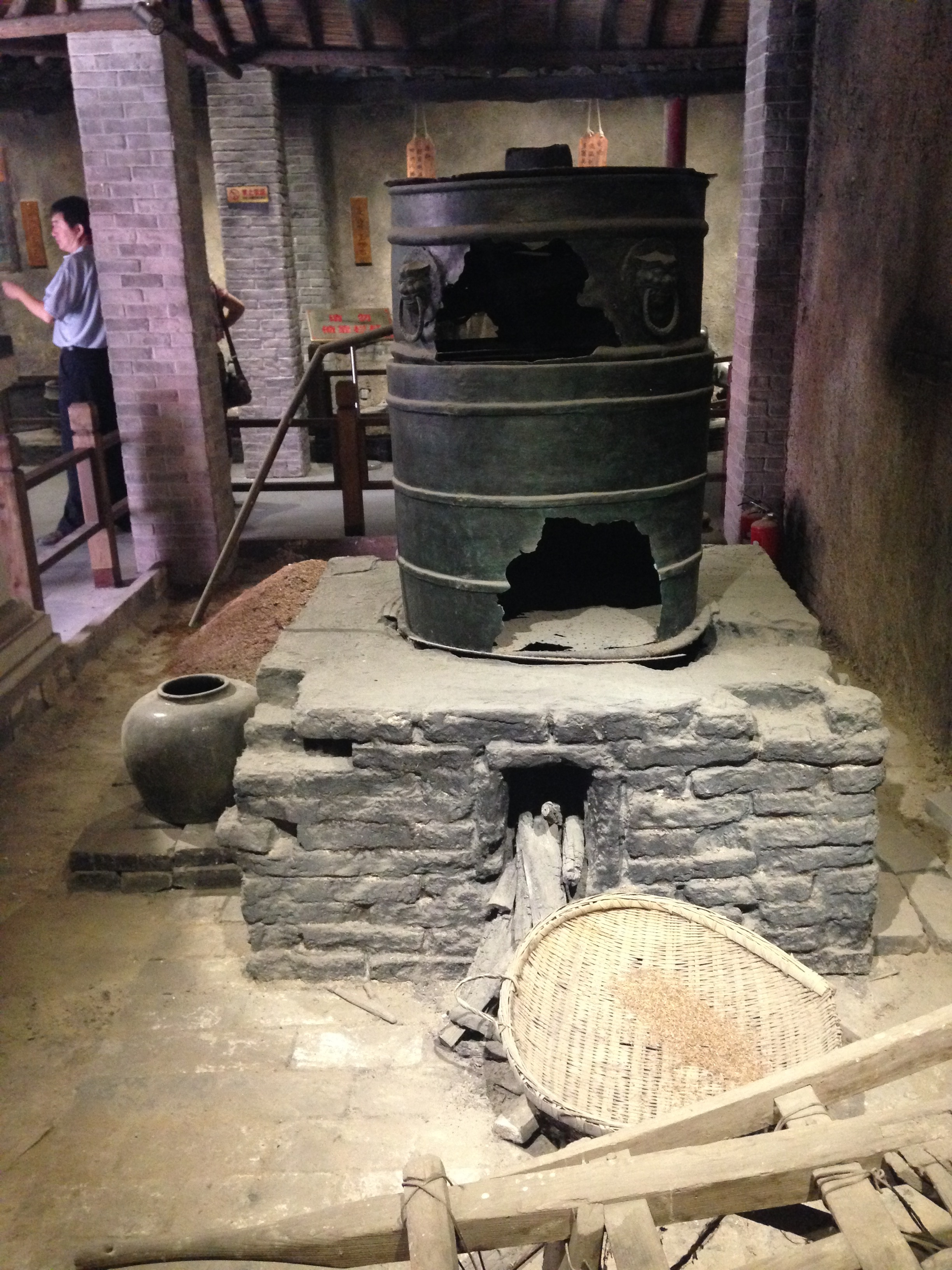 源昇号博物館・白酒醸造用の竃